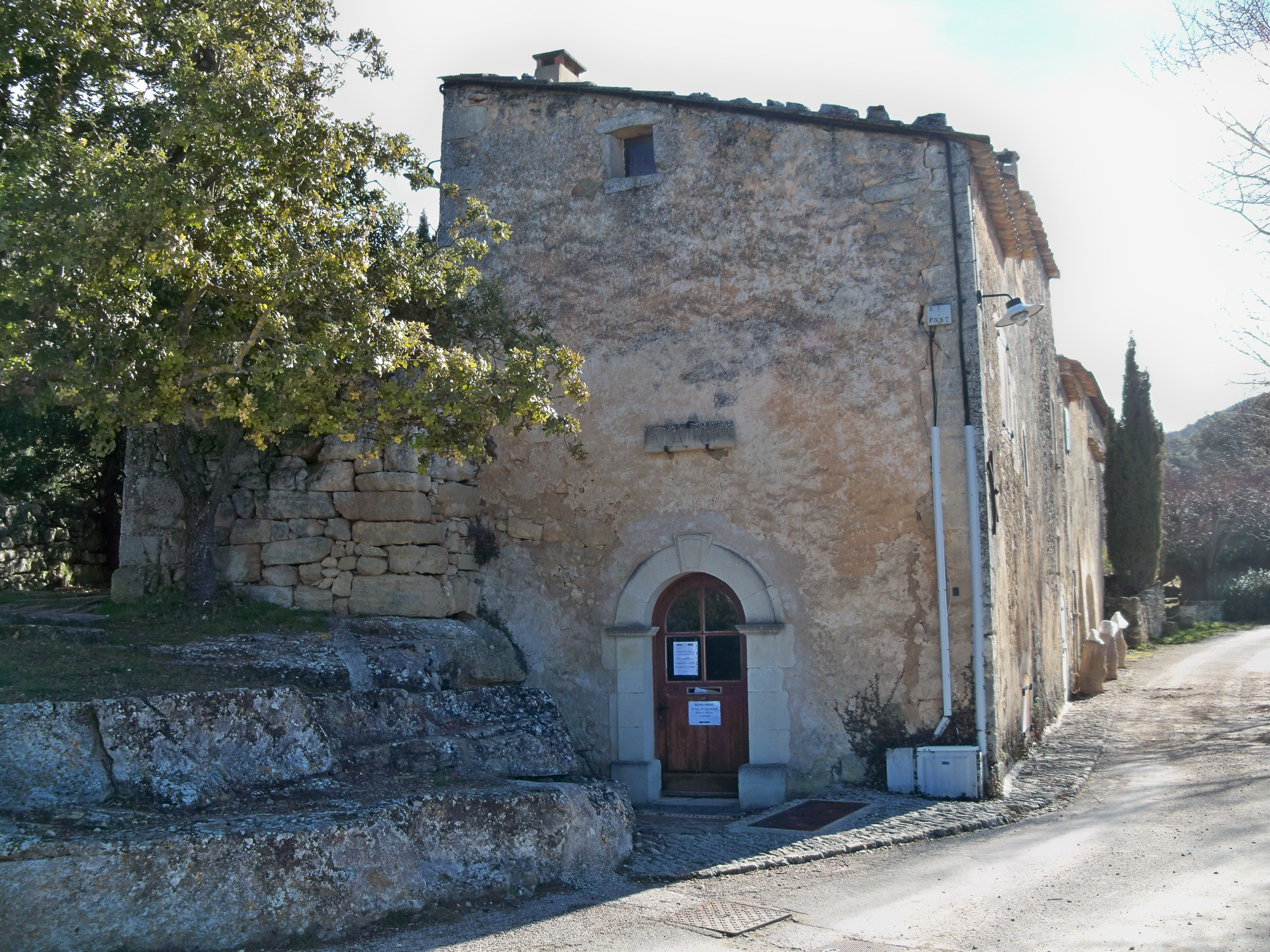 Mairie de Sivergues, Vaucluse